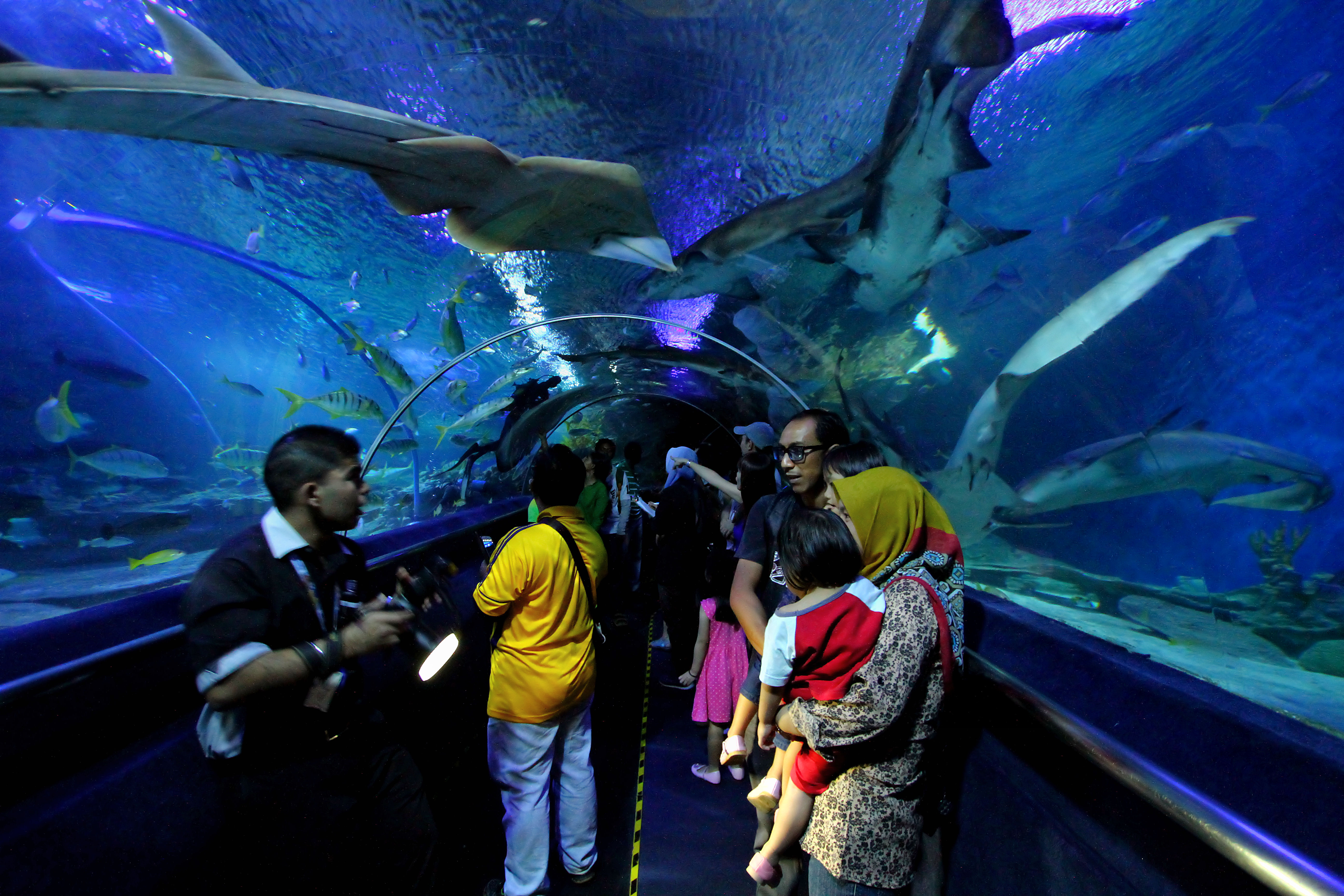 underwater tunnel in Aquaria KLCC